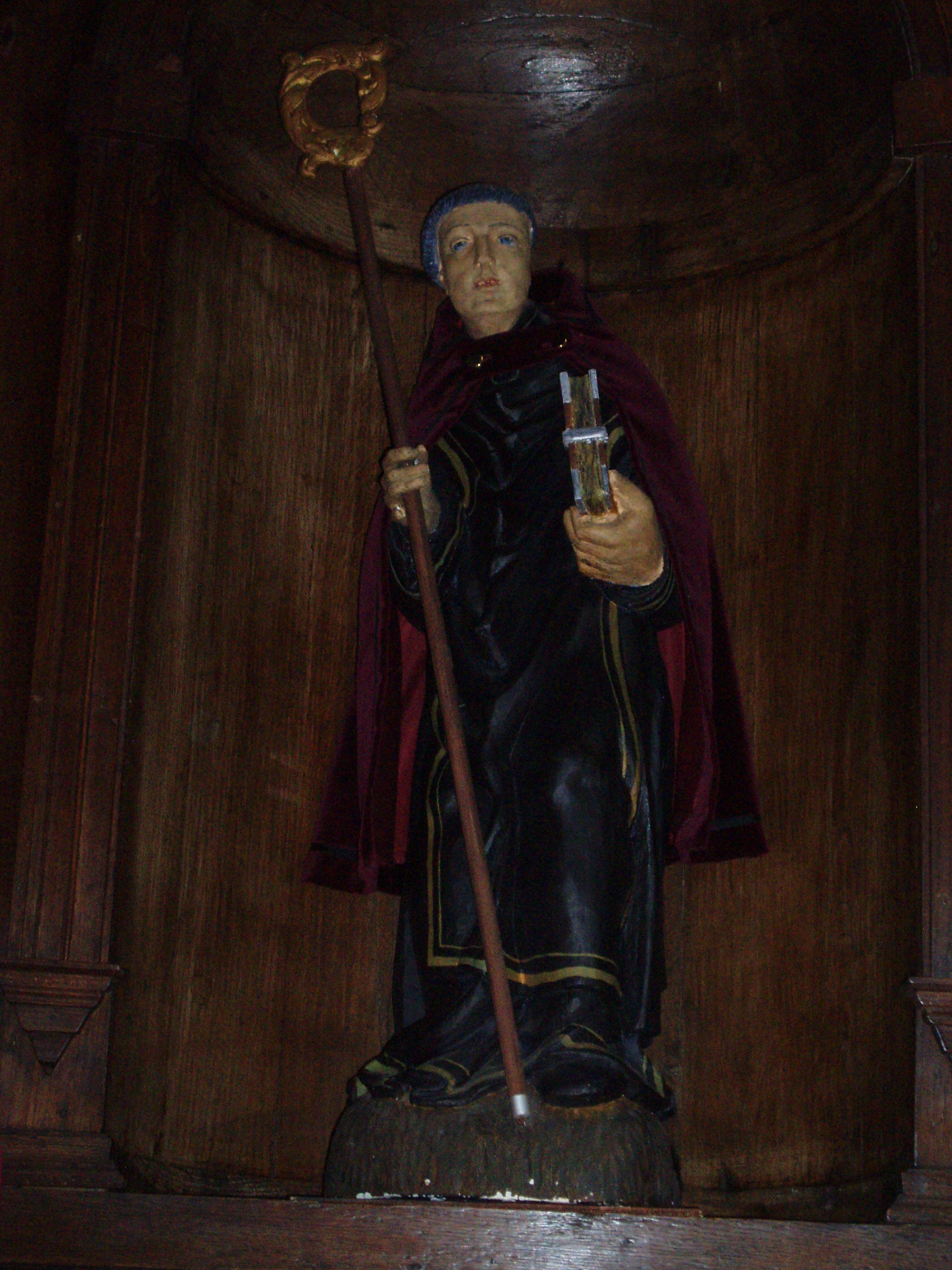 Beeld van de H. Maurus in de Onze-Lieve-Vrouw ten Steenkapel